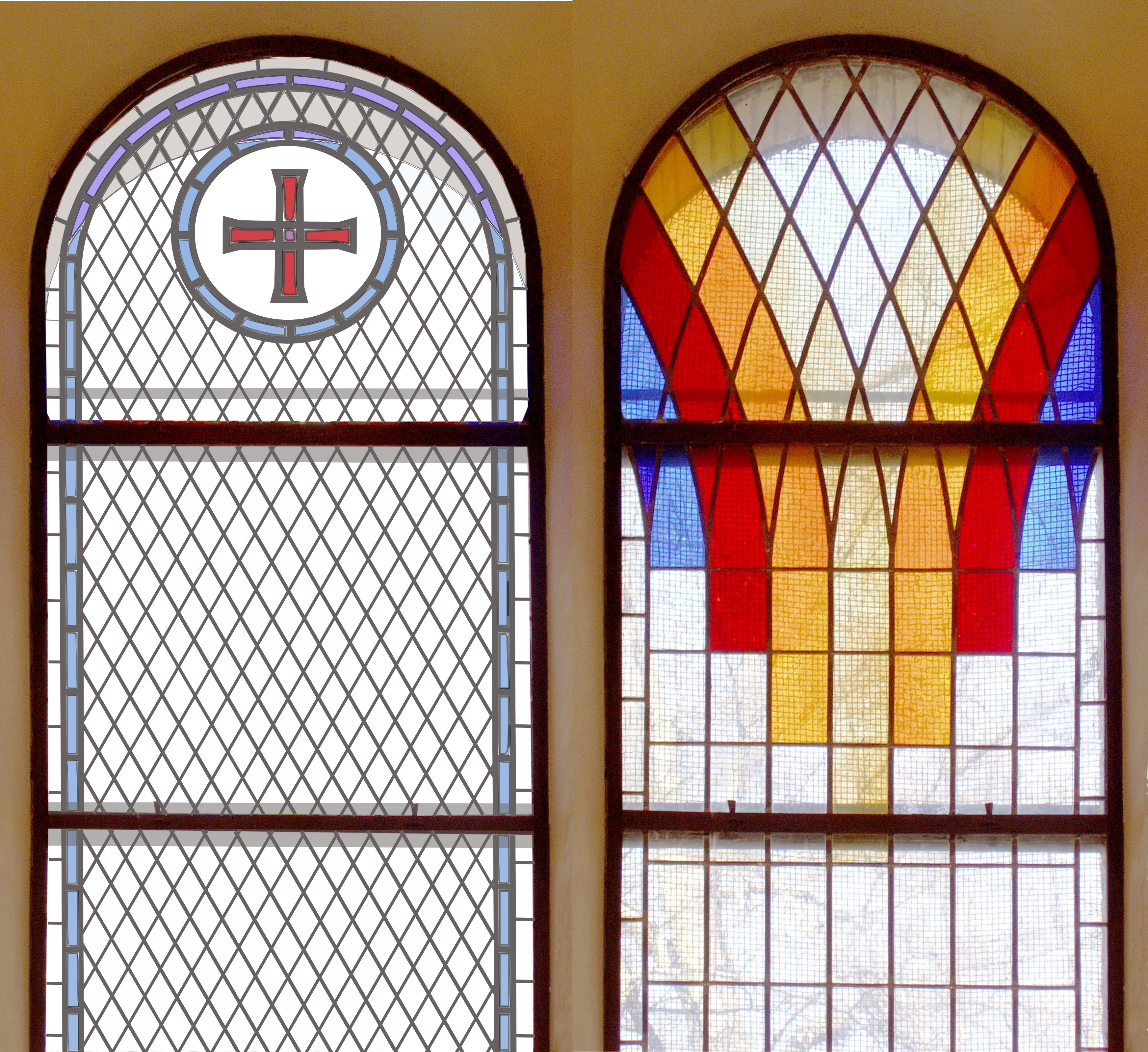 Evangelische Dorfkirche Glienicke/Nordbahn: Die Fenster im Innenraum in der Form von 1865 (Skizze) und von 1984 (Aufnahme 2014)